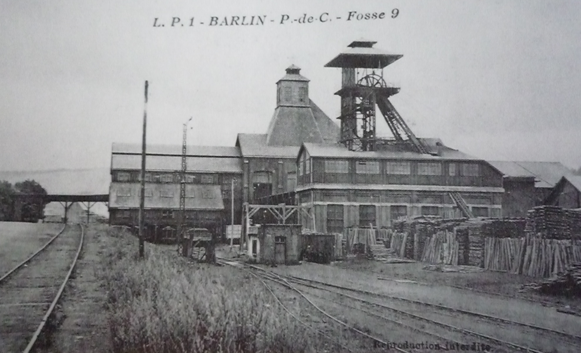 La Fosse n° 9 - 9 bis de la Compagnie des mines de Nœux était un charbonnage constitué de deux puits situé à Hersin-Coupigny, Pas-de-Calais, Nord-Pas-de-Calais, France.